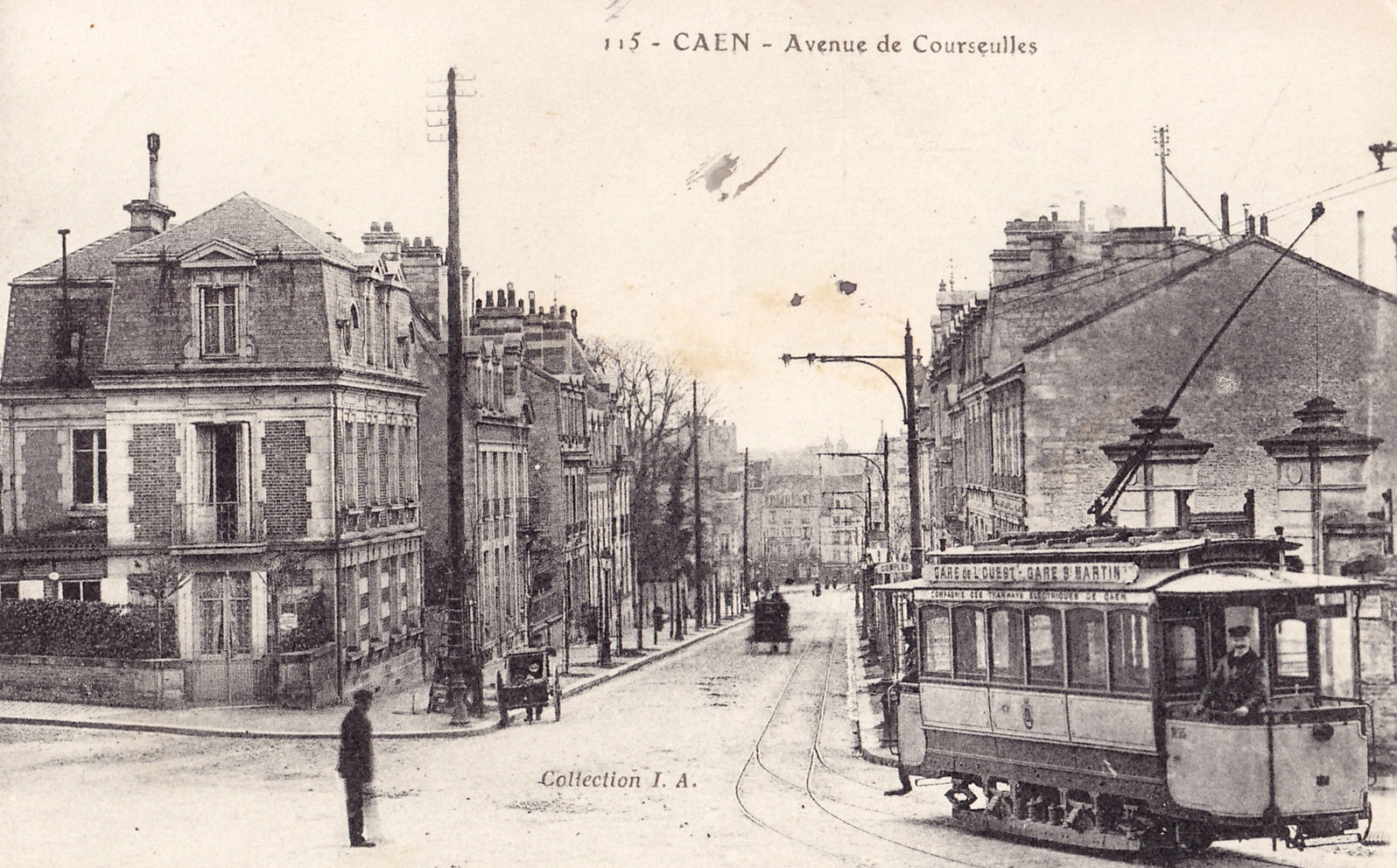 Carte postale ancienne éditée par I.A., n°115 : CAEN - Avenue de Courseulles